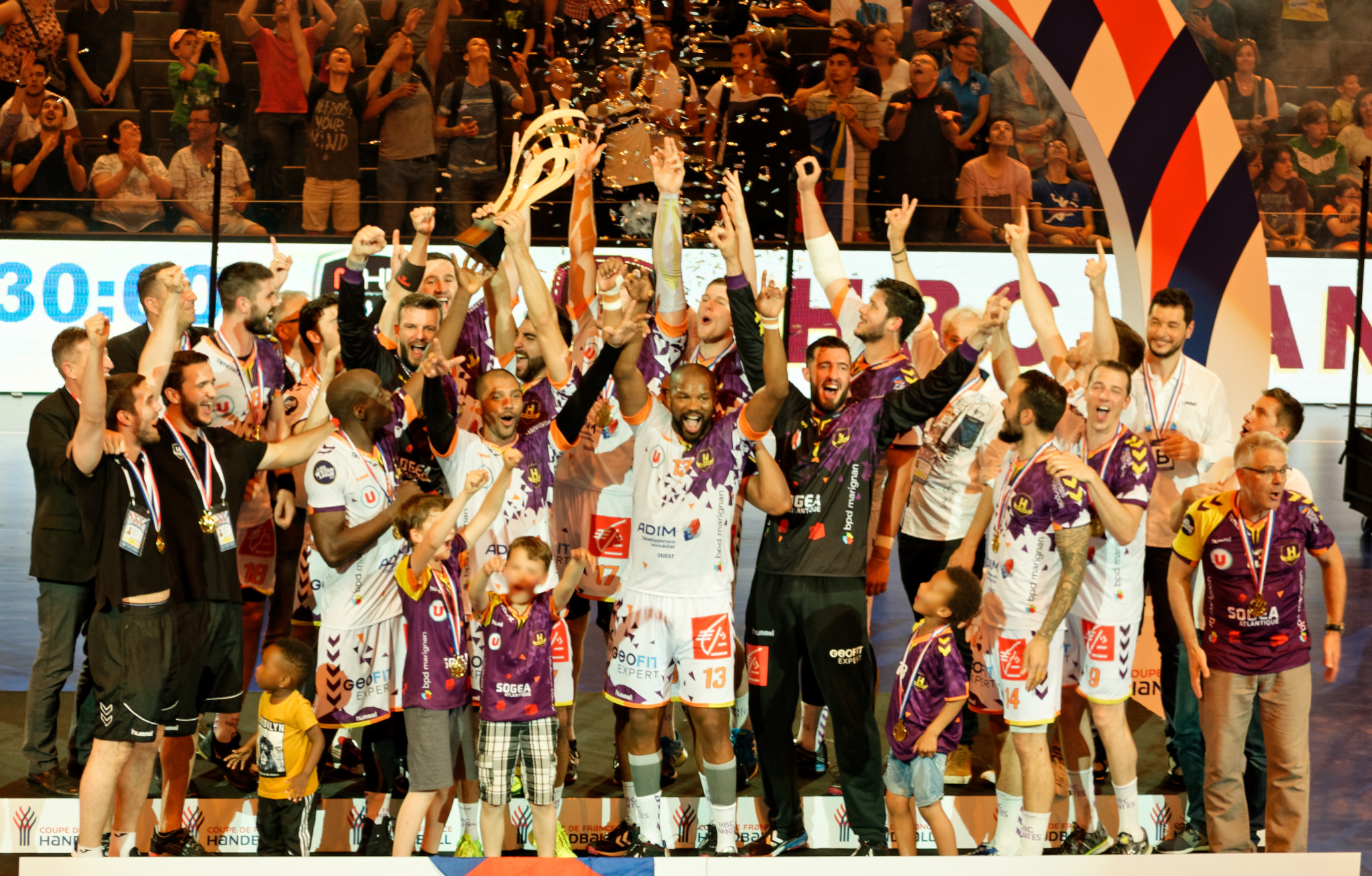 Nantes vainqueurs de la coupe de France 2016-17 de handball face à Montpellier. A Bercy, le 27 mai 2017.